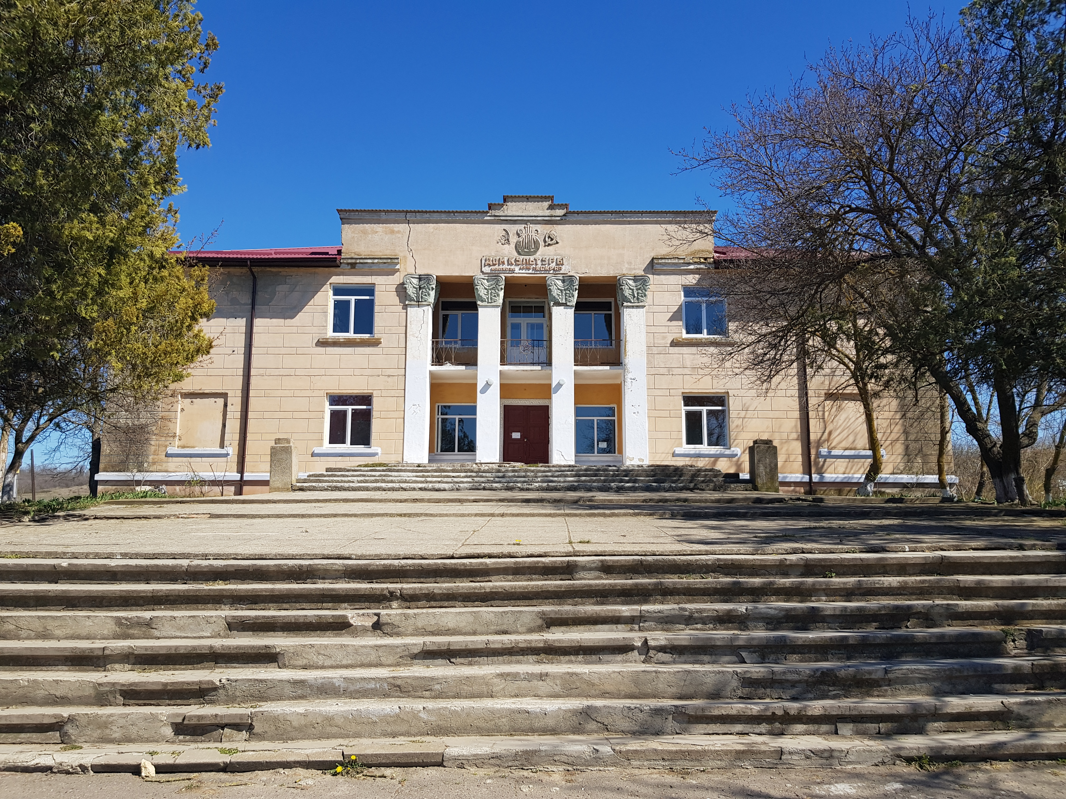 Дом Культуры в селе Ряснополь.